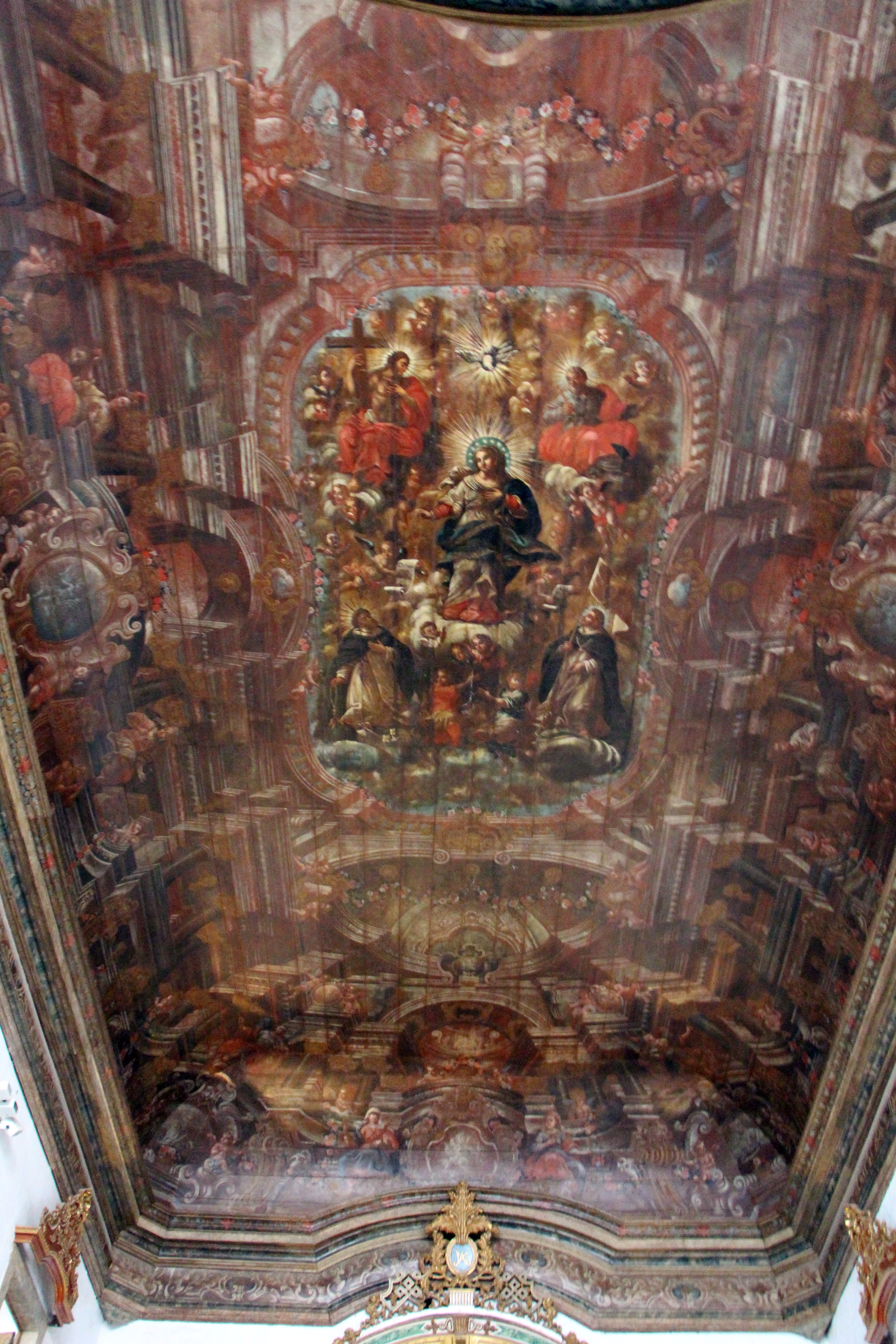 Igreja de Nossa Senhora do Rosário dos Pretos